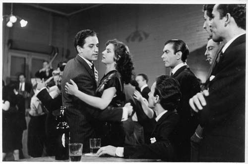 Fotografía durante la filmación de la película Barrio Gris